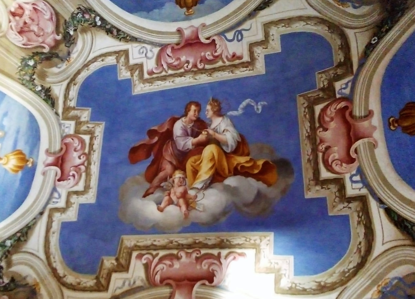 Palazzo Fogaccia-interni soffitti